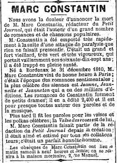 Notice nécrologique du chansonnier et journaliste français Marc Constantin